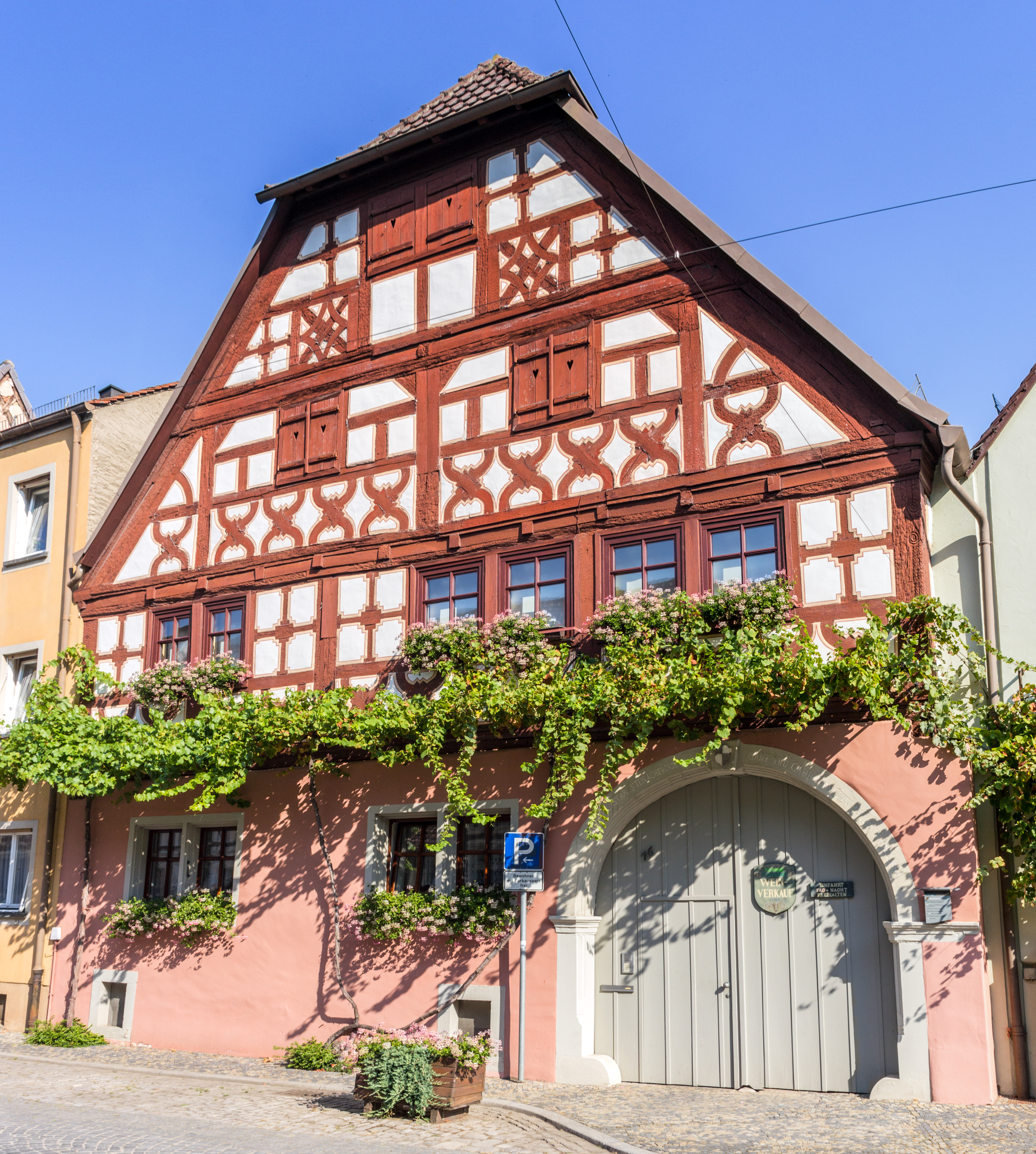 Prichsenstadt, Wohnhaus, Luitpoldstraße 16This is a photograph of an architectural monument.